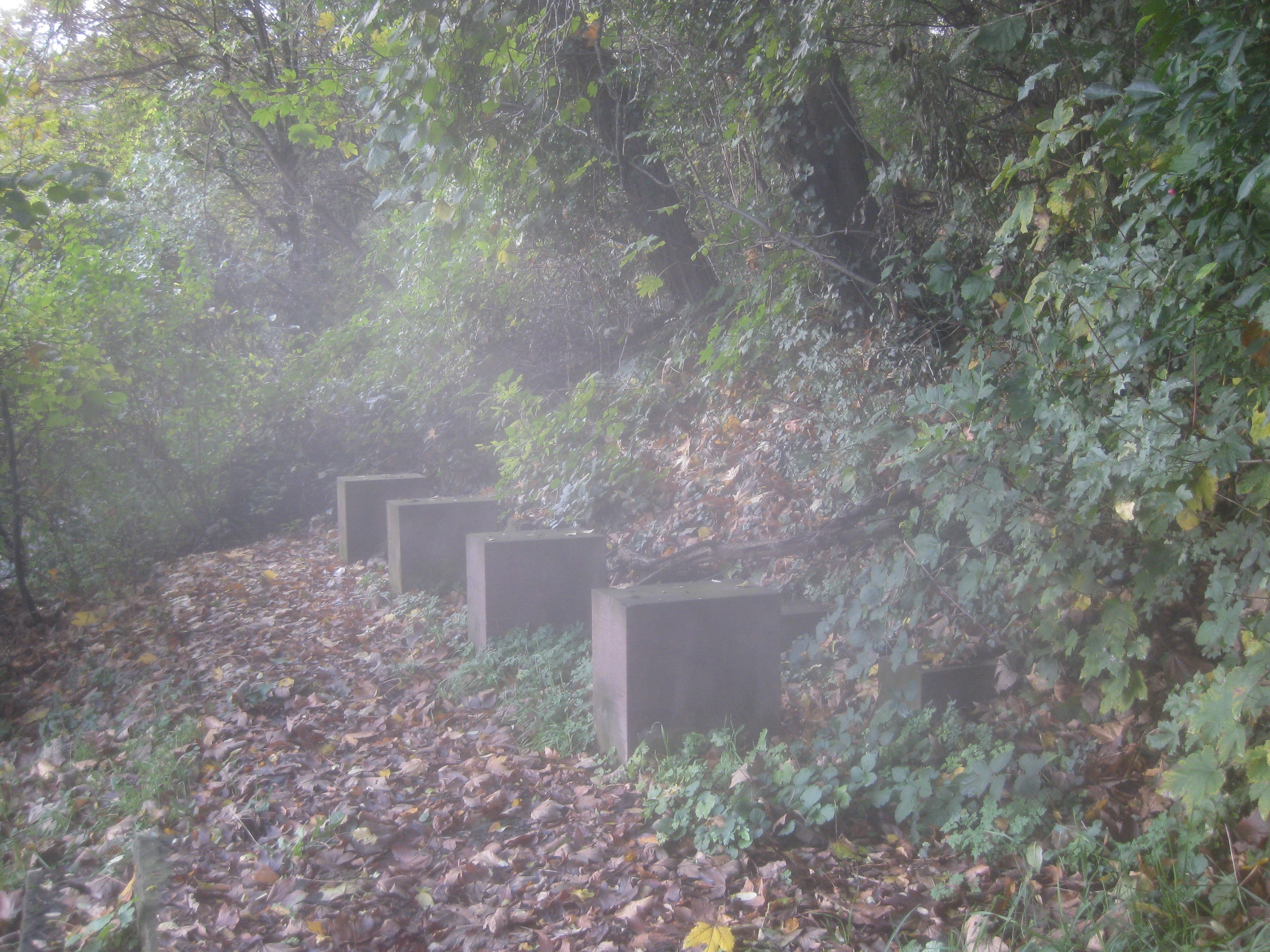 Unvollendete Sitzgruppe bei der Lyrikstation mit einem Gedicht („Der gönnt“) von Peter Schlack, östlich der Kunststation Im Keuper von Hans Dieter Bohnet auf dem Wartberggelände in Stuttgart.